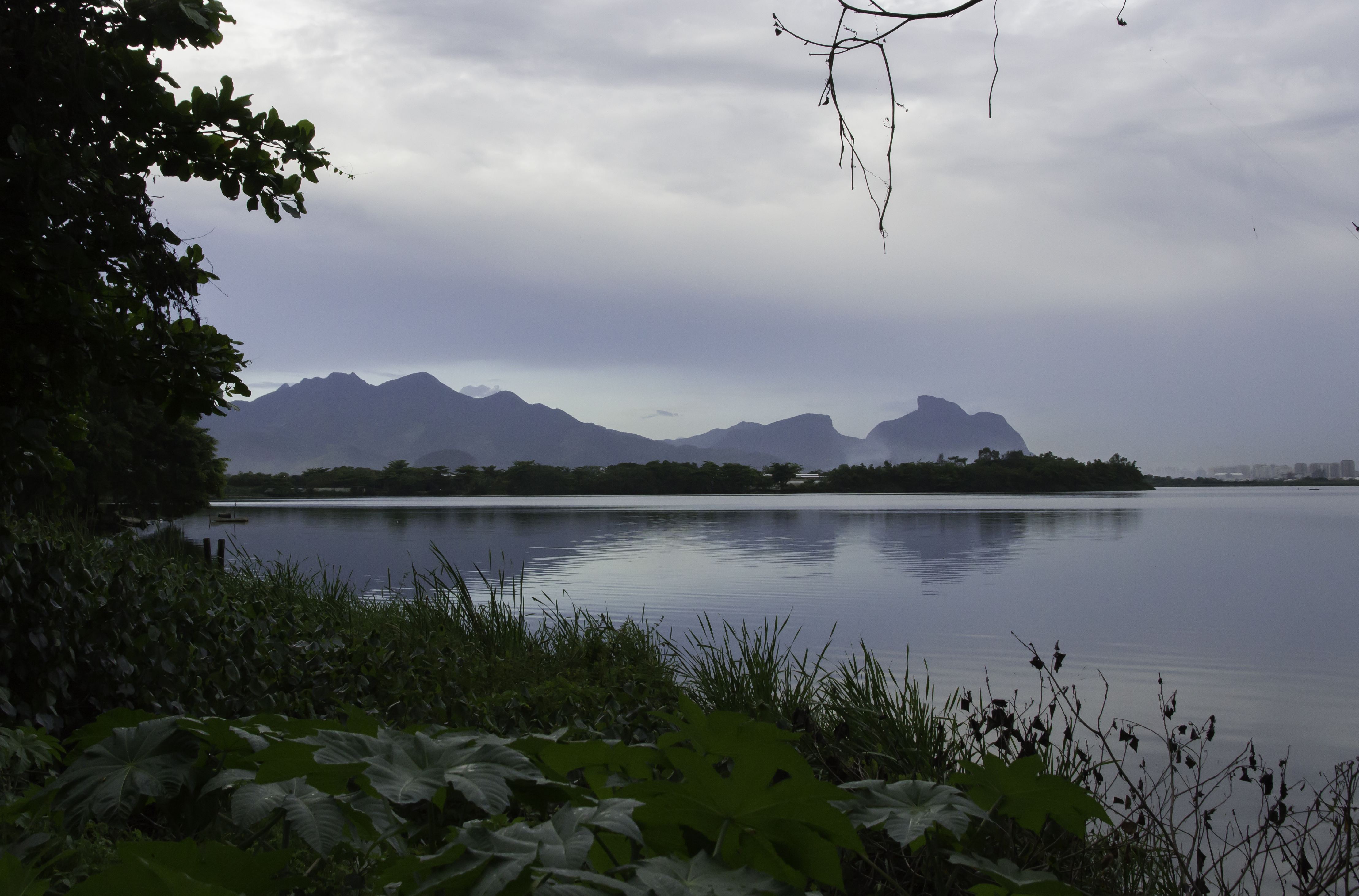 Lado localizado proximo do futuro local dos Jogos Olímpicos de 2016, Barra da Tijuca. Vista partial dos morros da floresta da Tijuca atràs.